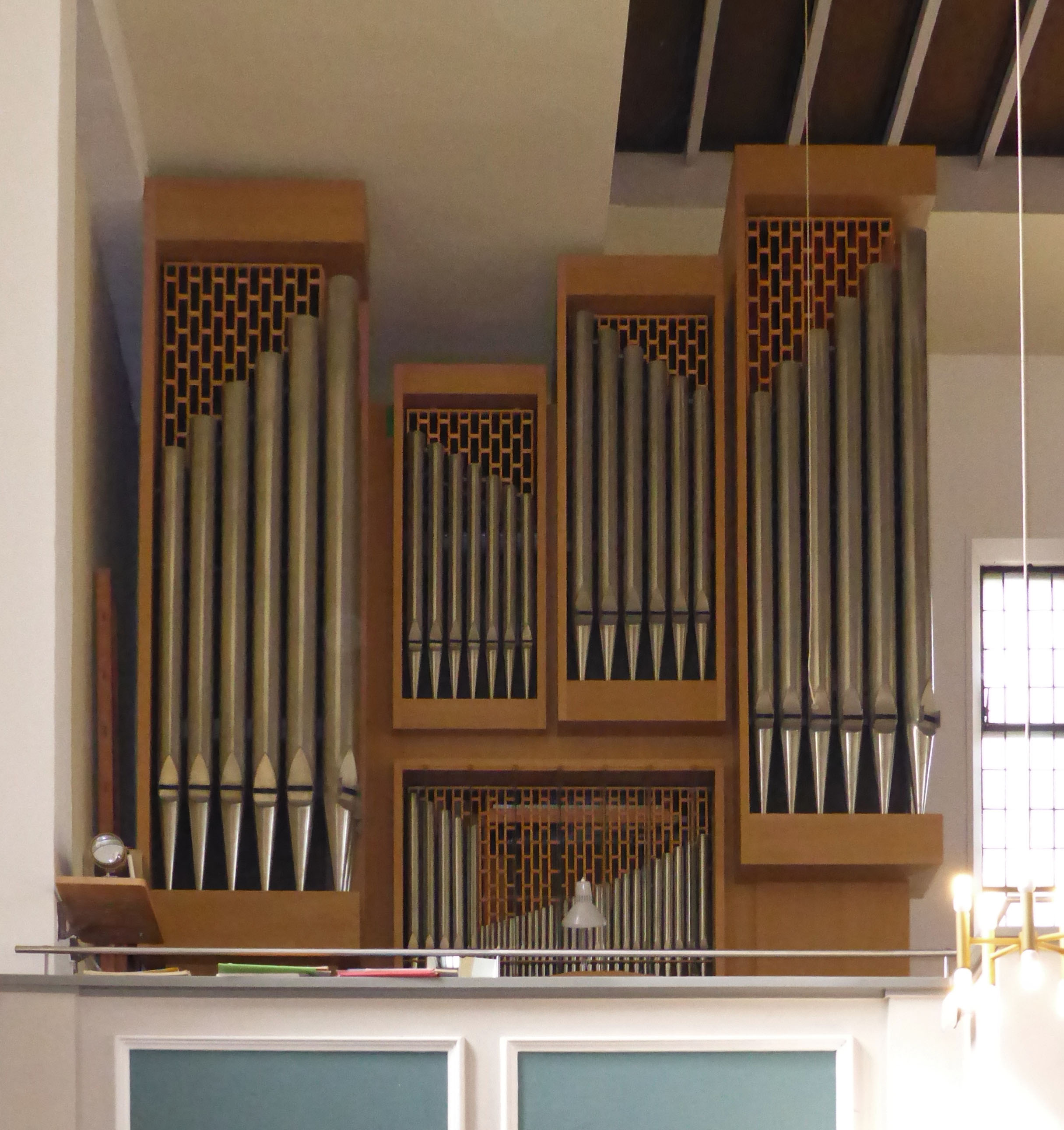 Stockmann-Orgel von 1976 in der katholischen St-Bernward-Kirche in Steterburg (Salzgitter).